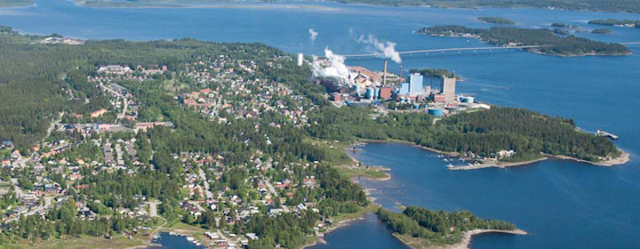 Flygbild över centrala Obbola.